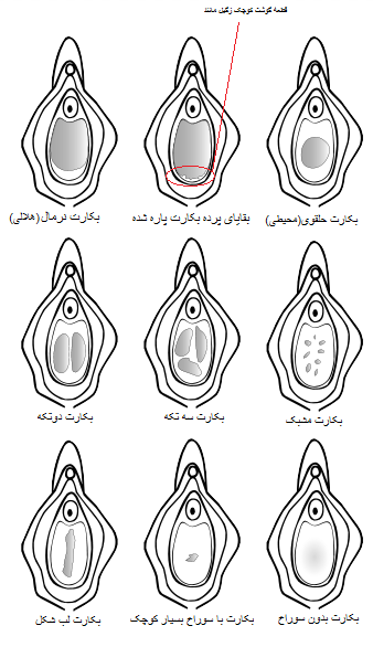 انواع پرده بکارت